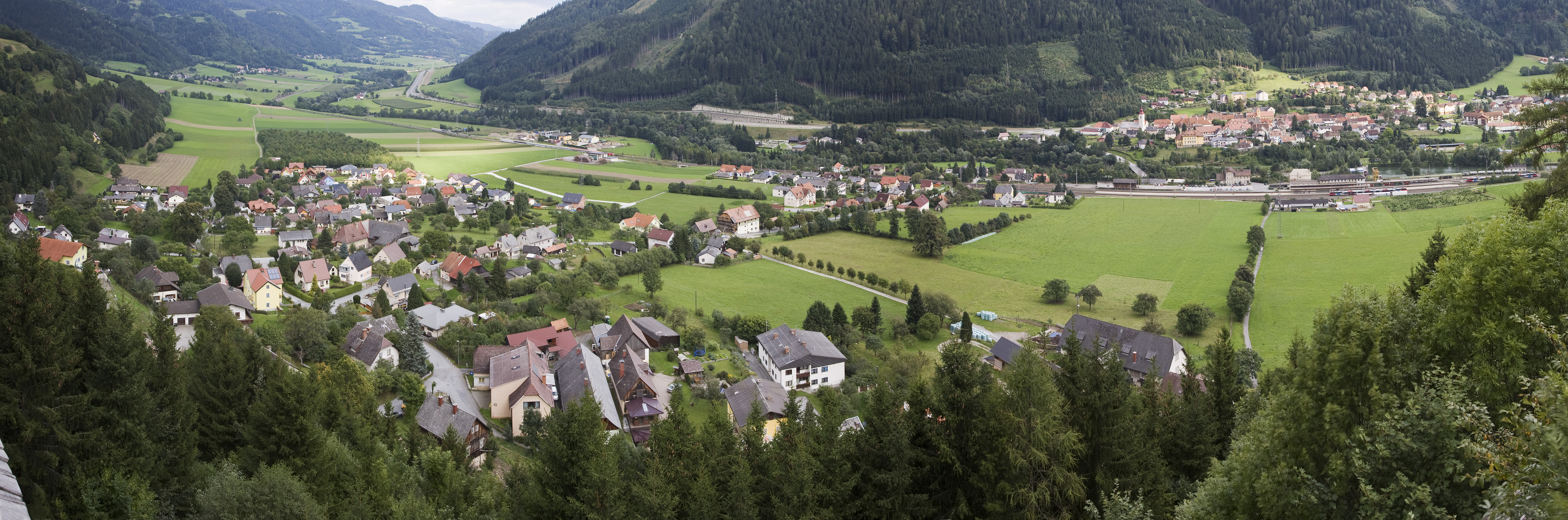 Blick auf die Orte Frauenburg und Unzmarkt von der Burgruine Frauenburg